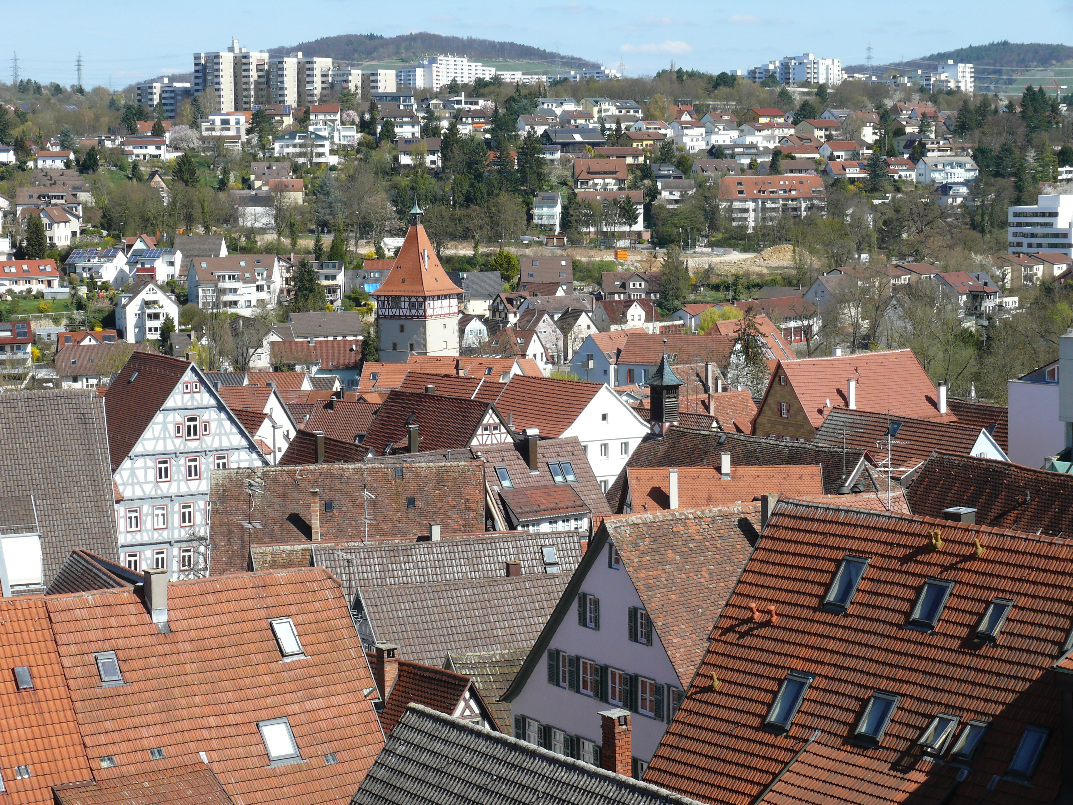 Blick vom Hochwachtturm auf die historische Altstadt von Waiblingen.